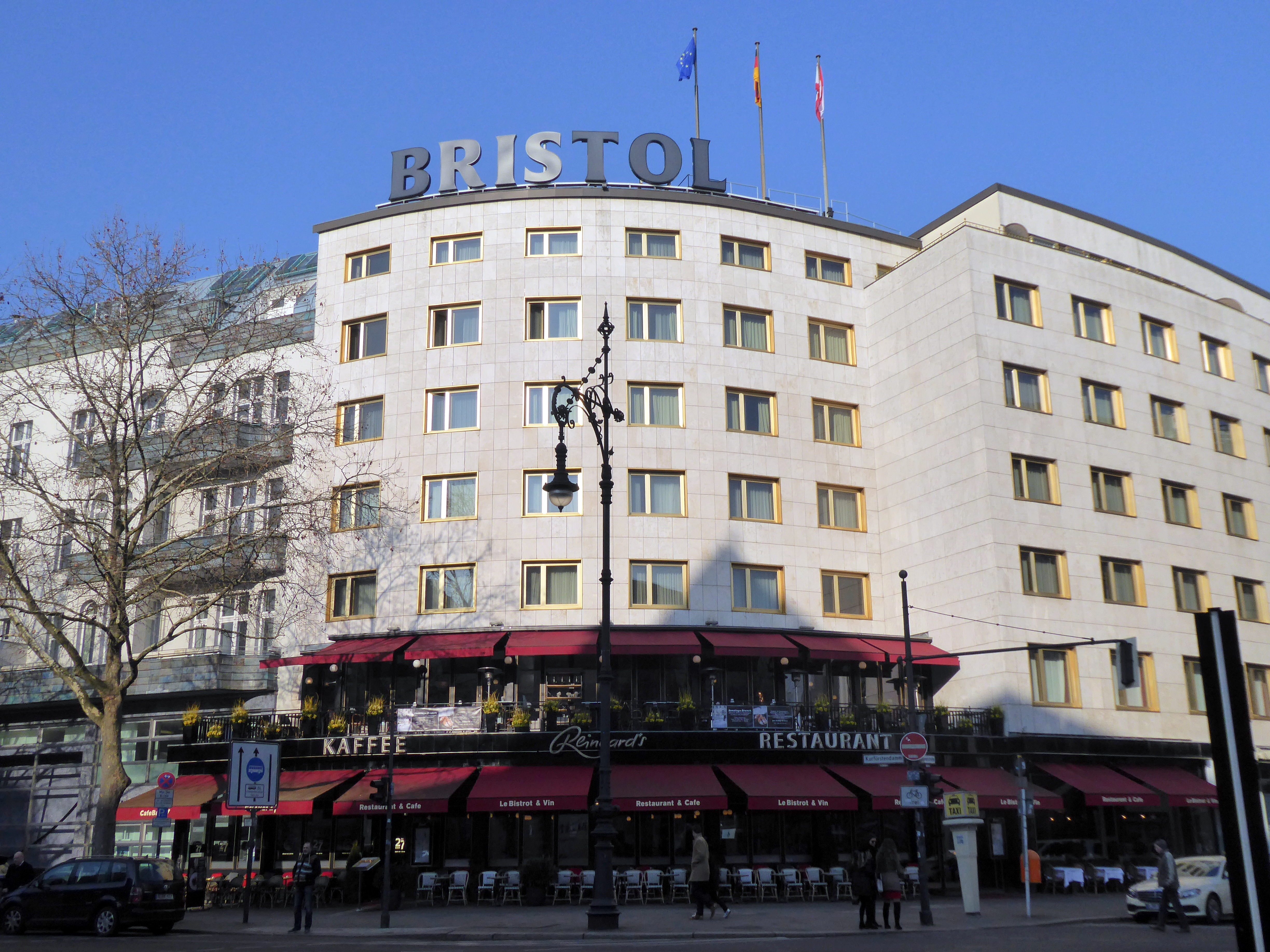 Charlottenburg Kurfürstendamm Hotel Bristol